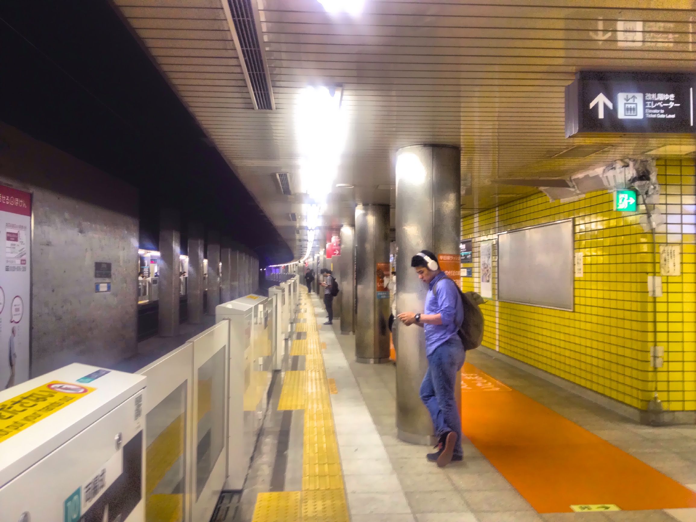 三軒茶屋駅のホーム (Sangenjaya station platform)